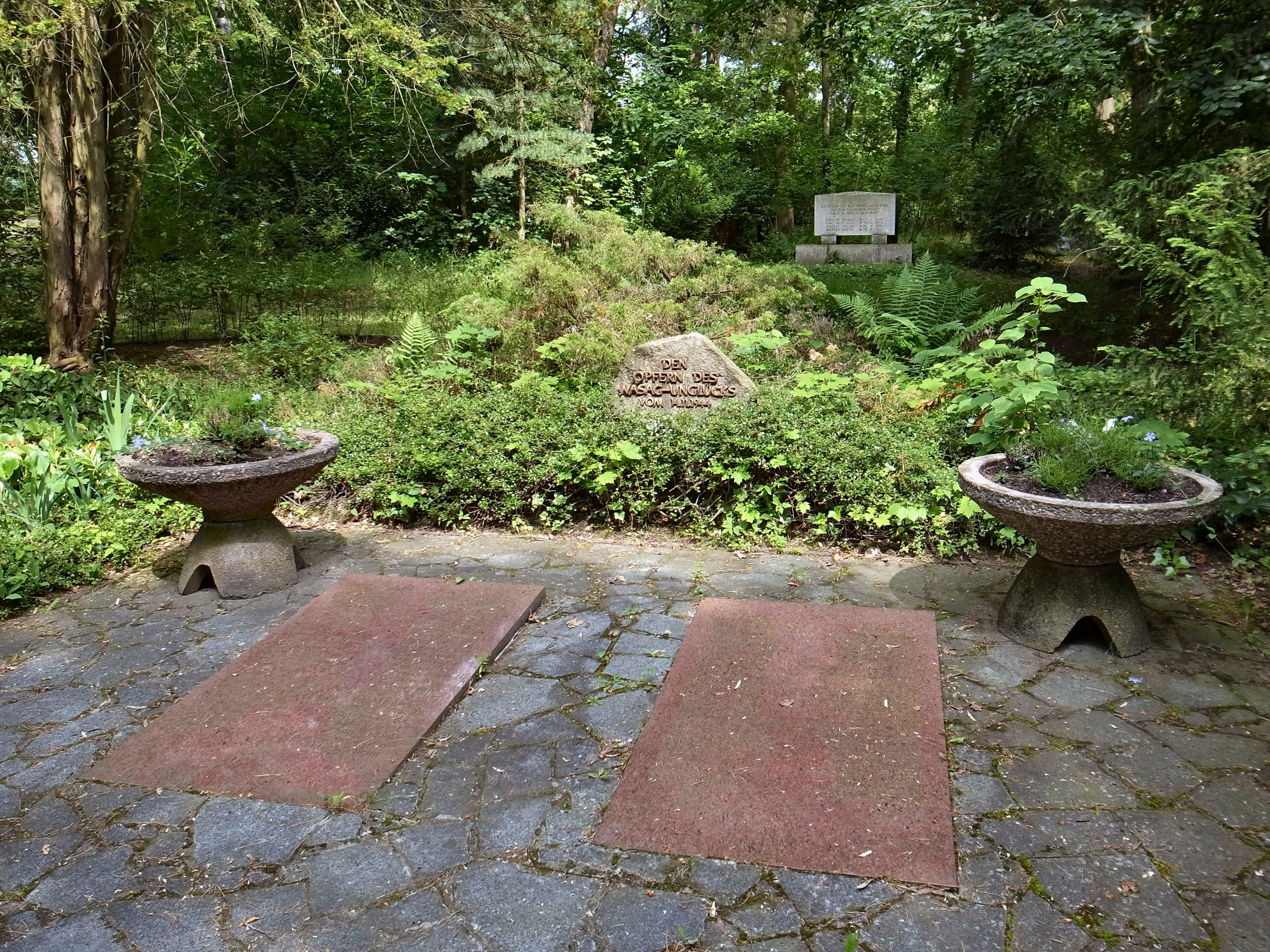 Coswig (Anhalt) Gedenkstein vom WASAG-Unglück am 14.11.1944, im Hintergrund der Gedenkstein vom Explosionsunglück in Reinsdorf 1935 (Quelle